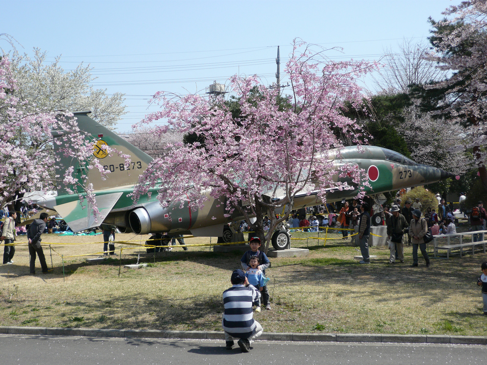 JASDF Kumagaya Air Base 航空自衛隊熊谷基地